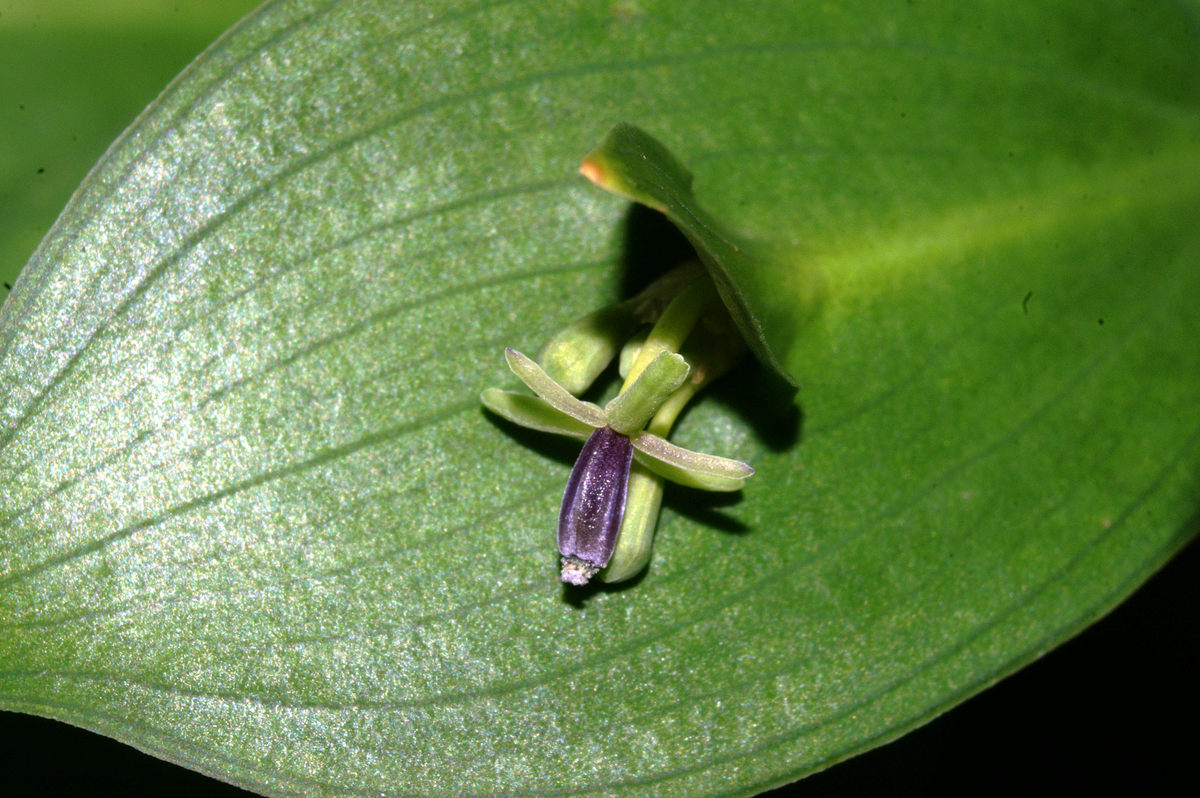 Širokolistna lobodika v Setnici.